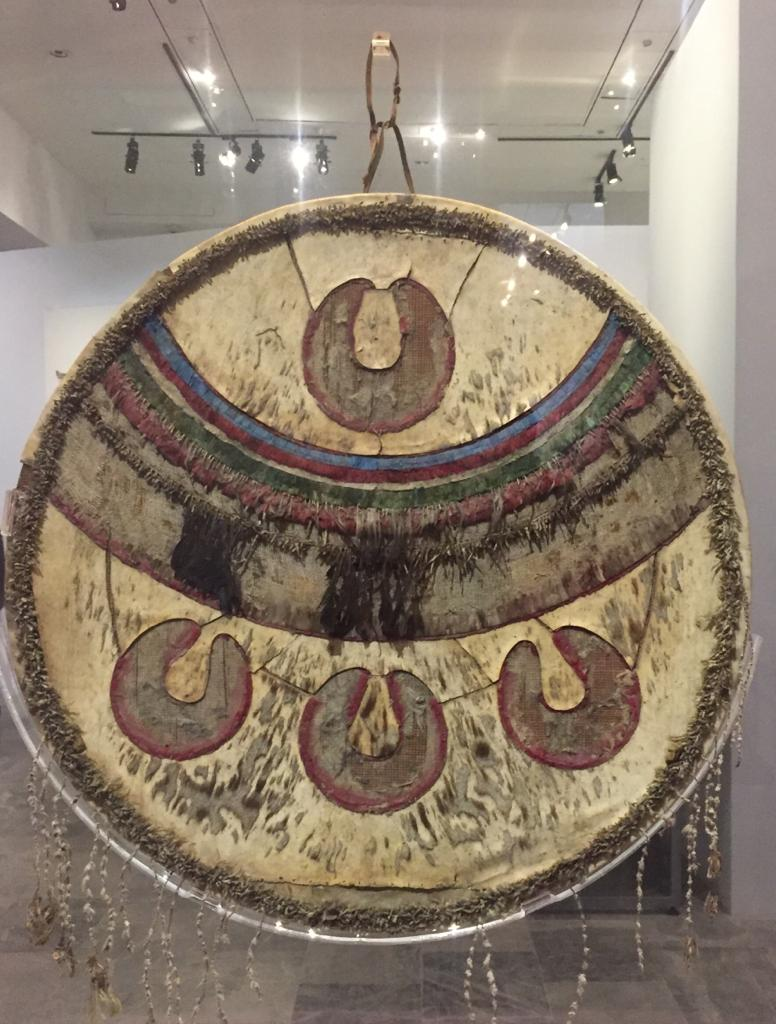 Chimalli del Museo Nacional de Historia, para muestra al público en la exposición temporal "Chimalli. Tesoro de Moctezuma en Chapultepec" llevada a cabo en febrero del 2019 en el Museo Nacional de Historia.